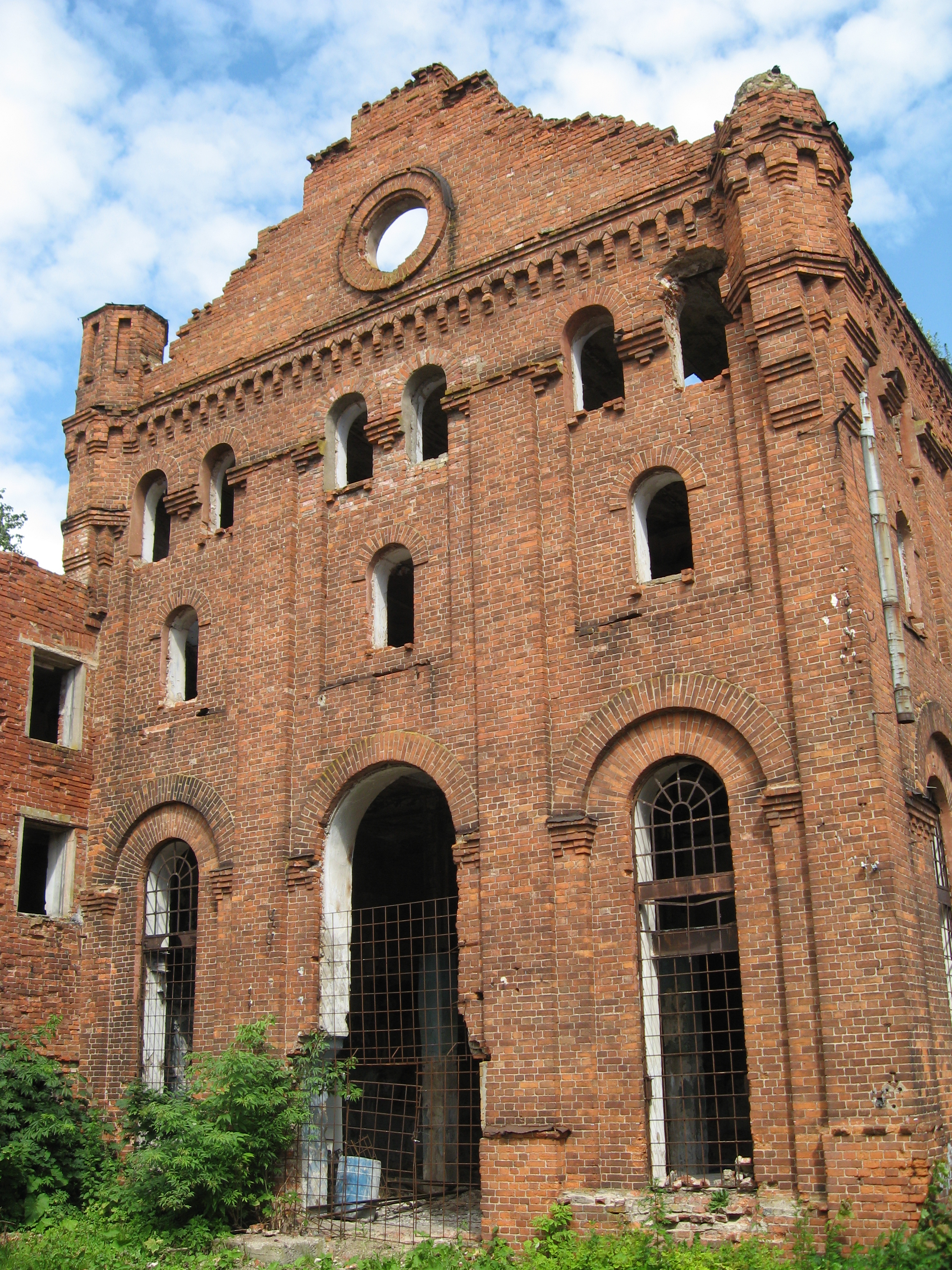 Пивзавод «Богемия», основан в 1878 году.